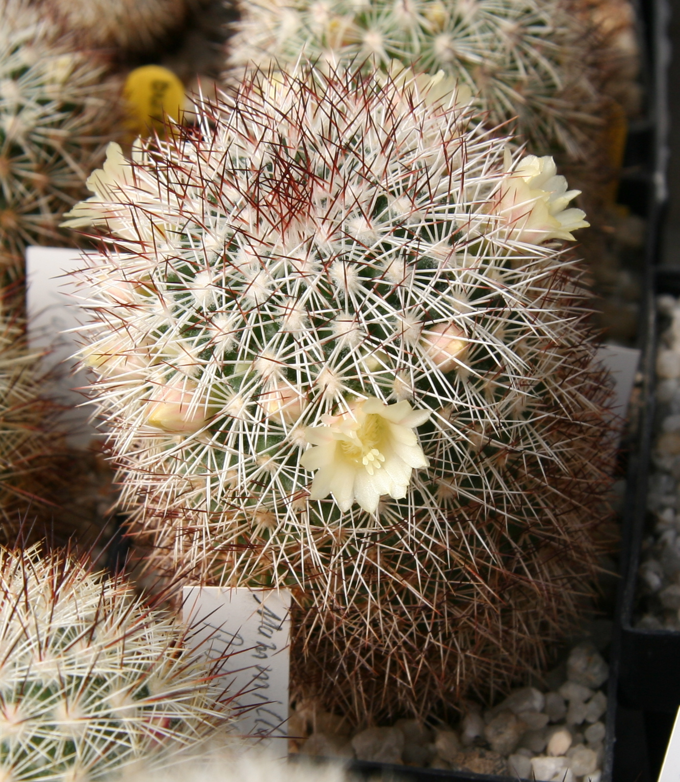 Mammillaria buxbaumiana